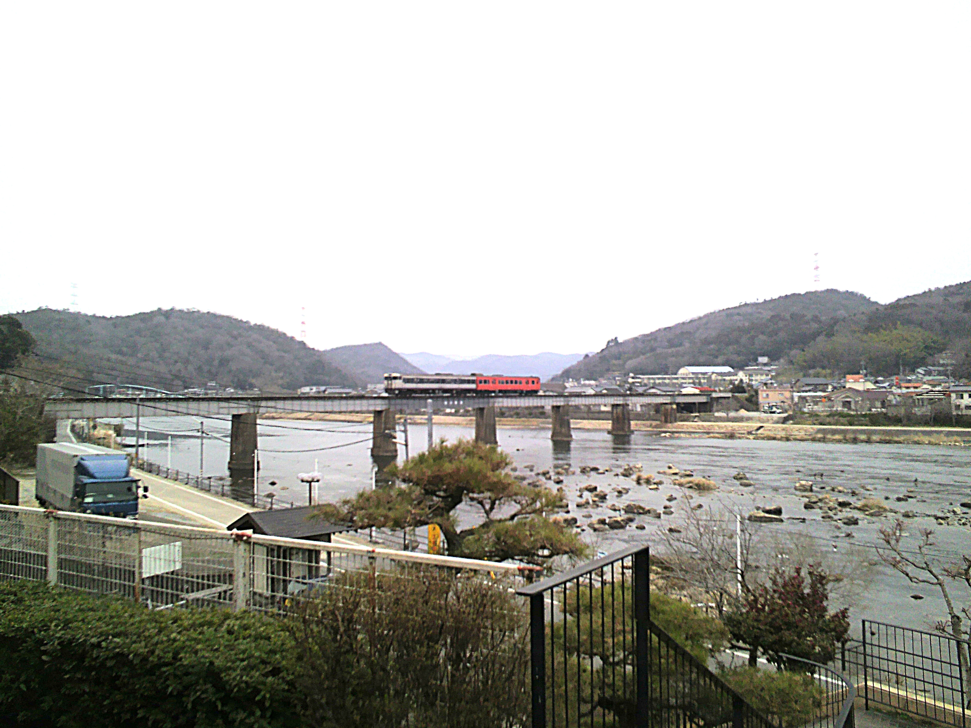 岡山市北区建部町 旭川を渡る津山線列車